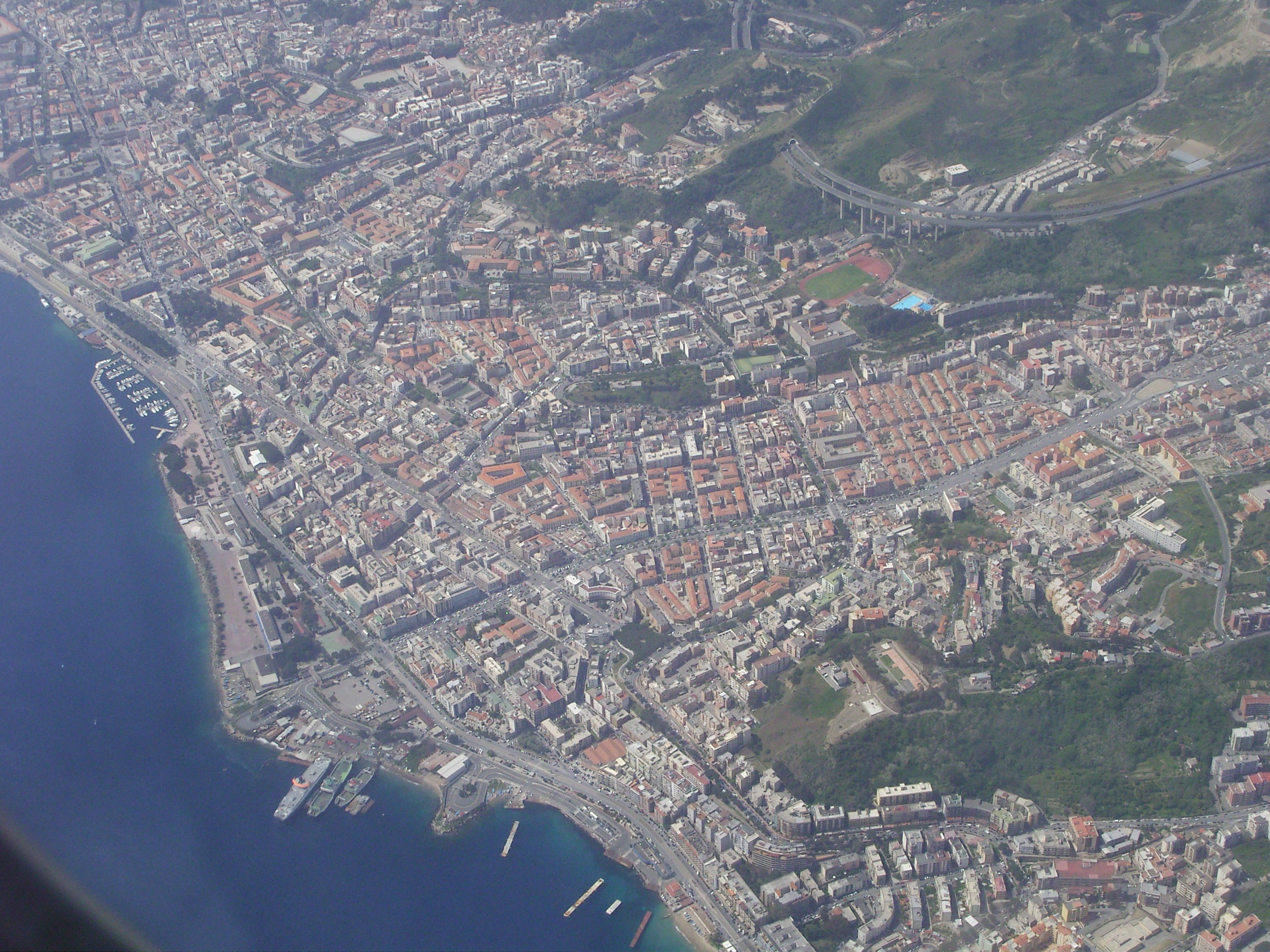 Messina (zona nord), veduta aerea. Fiera di Messina tra Approdo San Francesco e Viale Boccetta